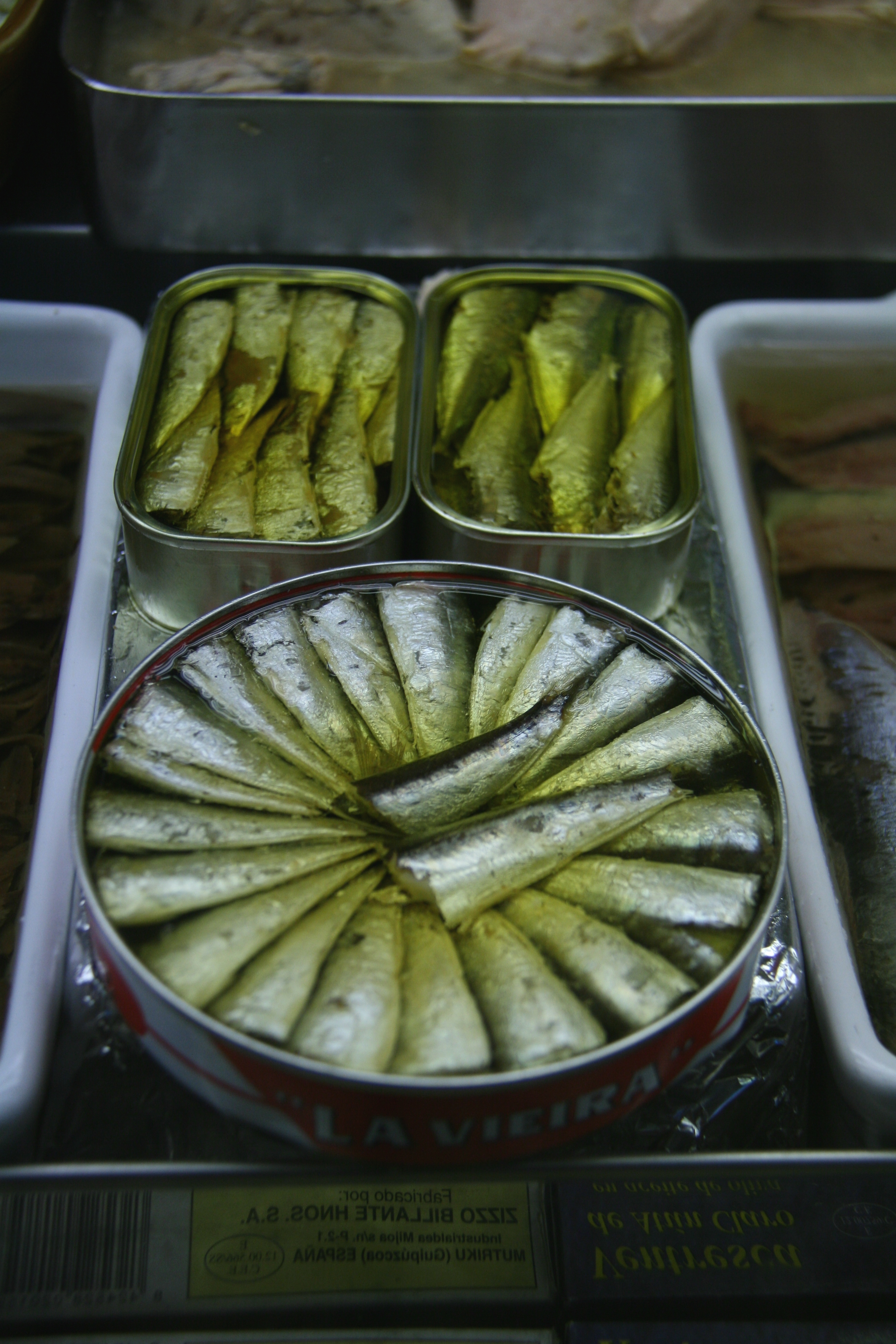 Conservas de sardinas